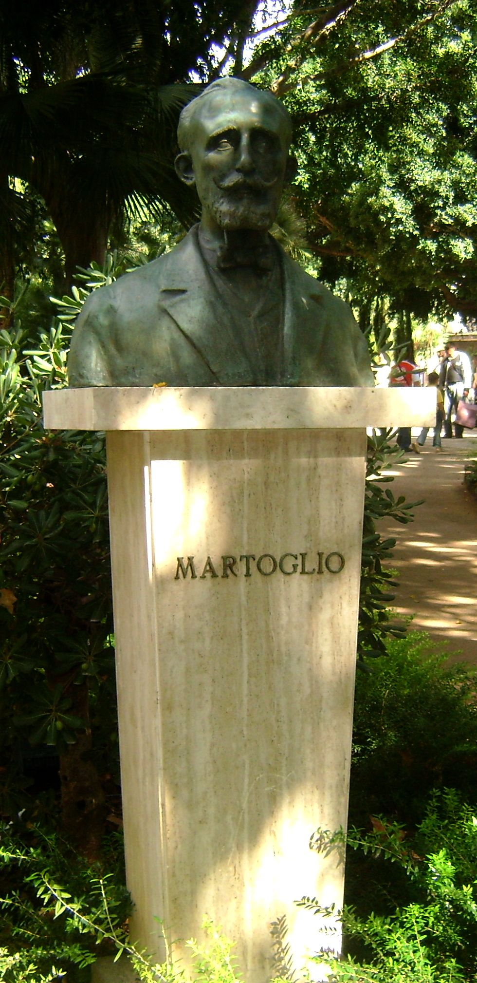 Nino Martoglio - Giardino Bellini - settembre 2010